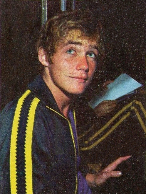 CAMPIONI dello SPORT 1973/74-Figurina n.241- COOPER - SINGAPORE -NUOTO